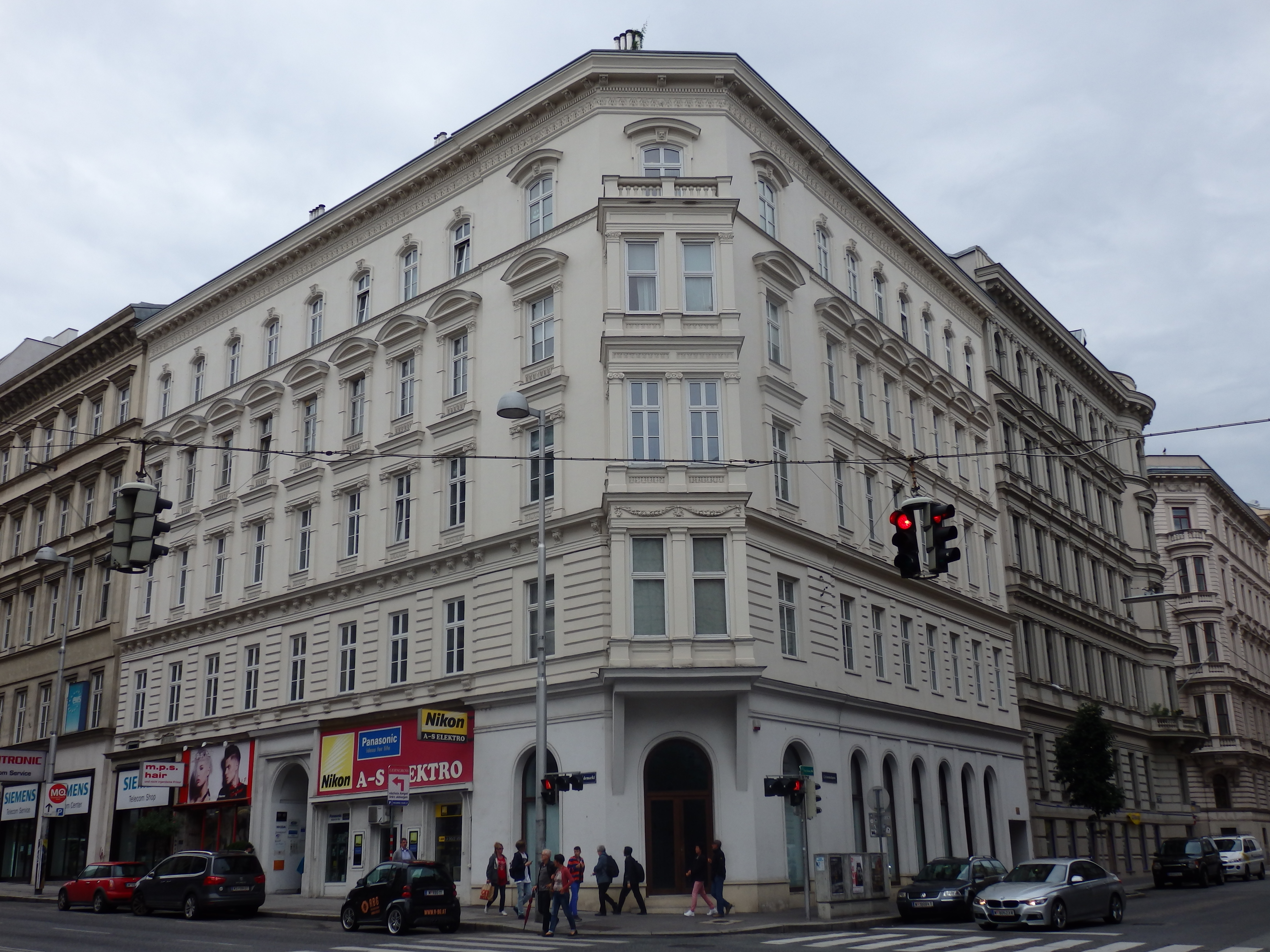 Haus (1869) von Anton Huber, Getreidemarkt 14, Wien-Innere Stadt